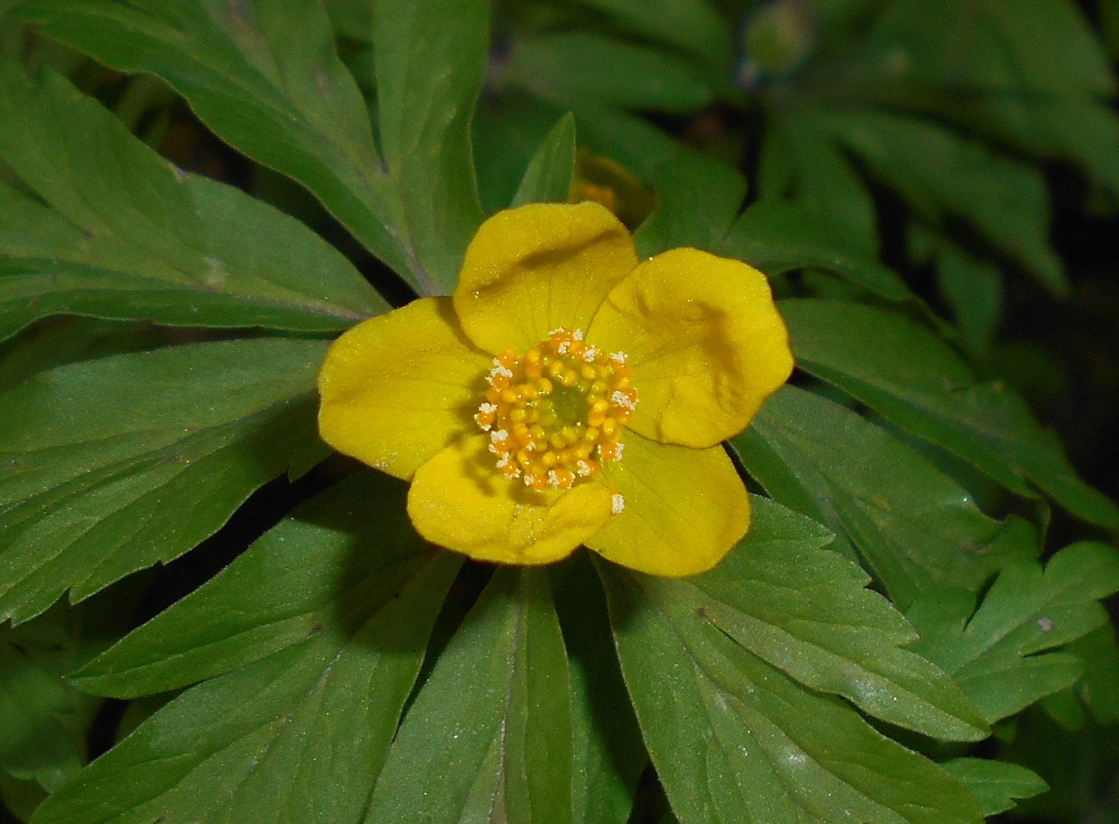 Zawilec żółty (Anemone ranunculoides), Ogród Saski w Lublinie